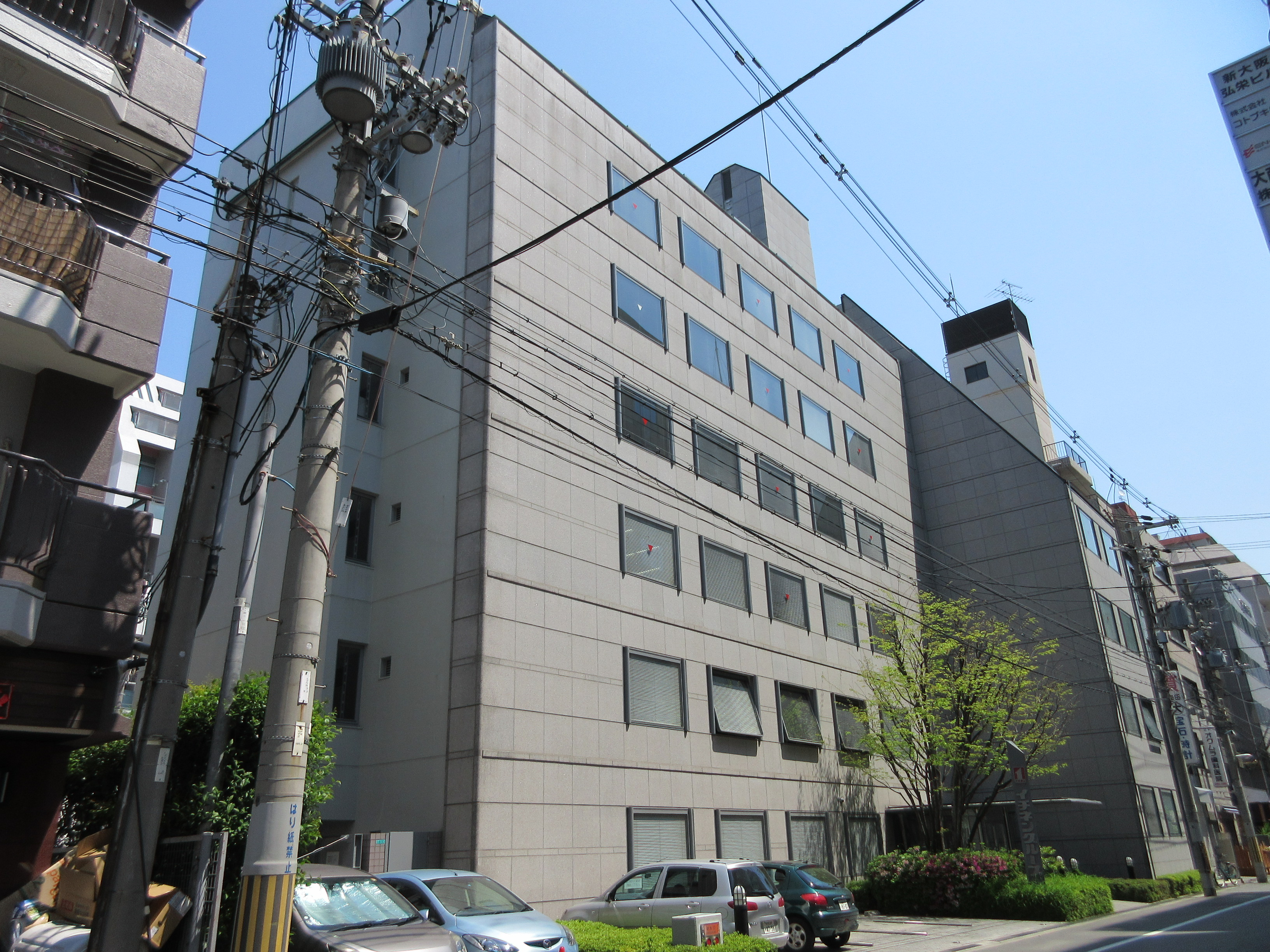 イチネンホールディングス本社